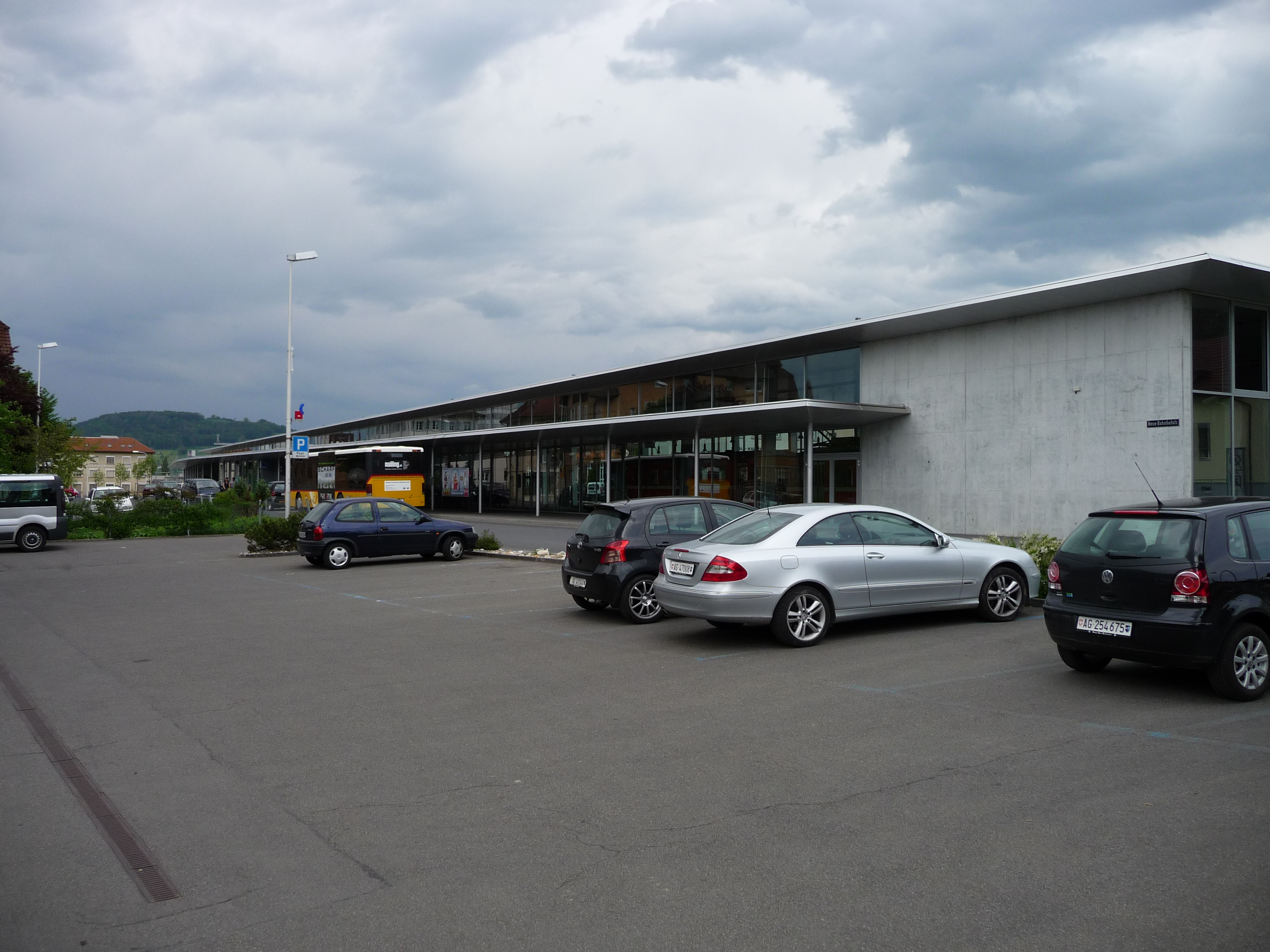 Der Bahnhof in